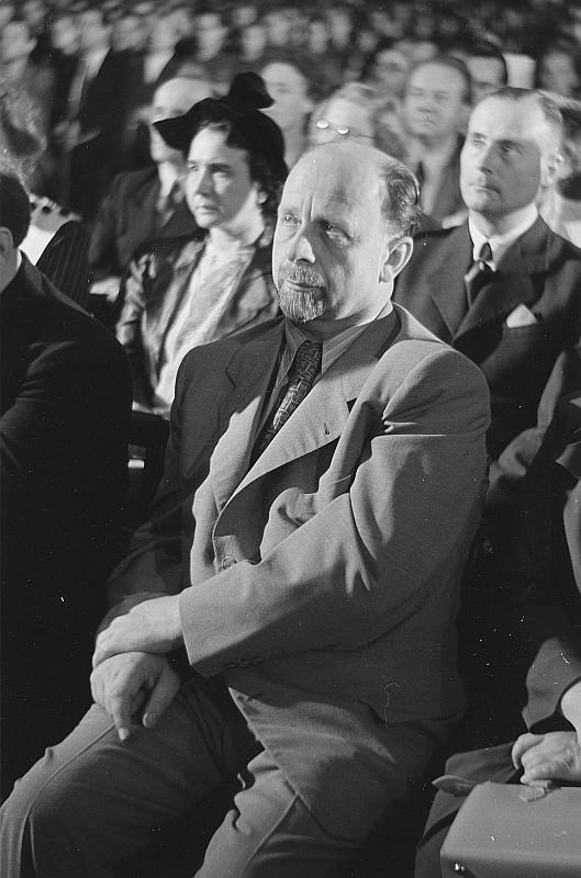 Original image description from the Deutsche Fotothek Portrait Walter Ulbrichts im Publikum der Bachfeier